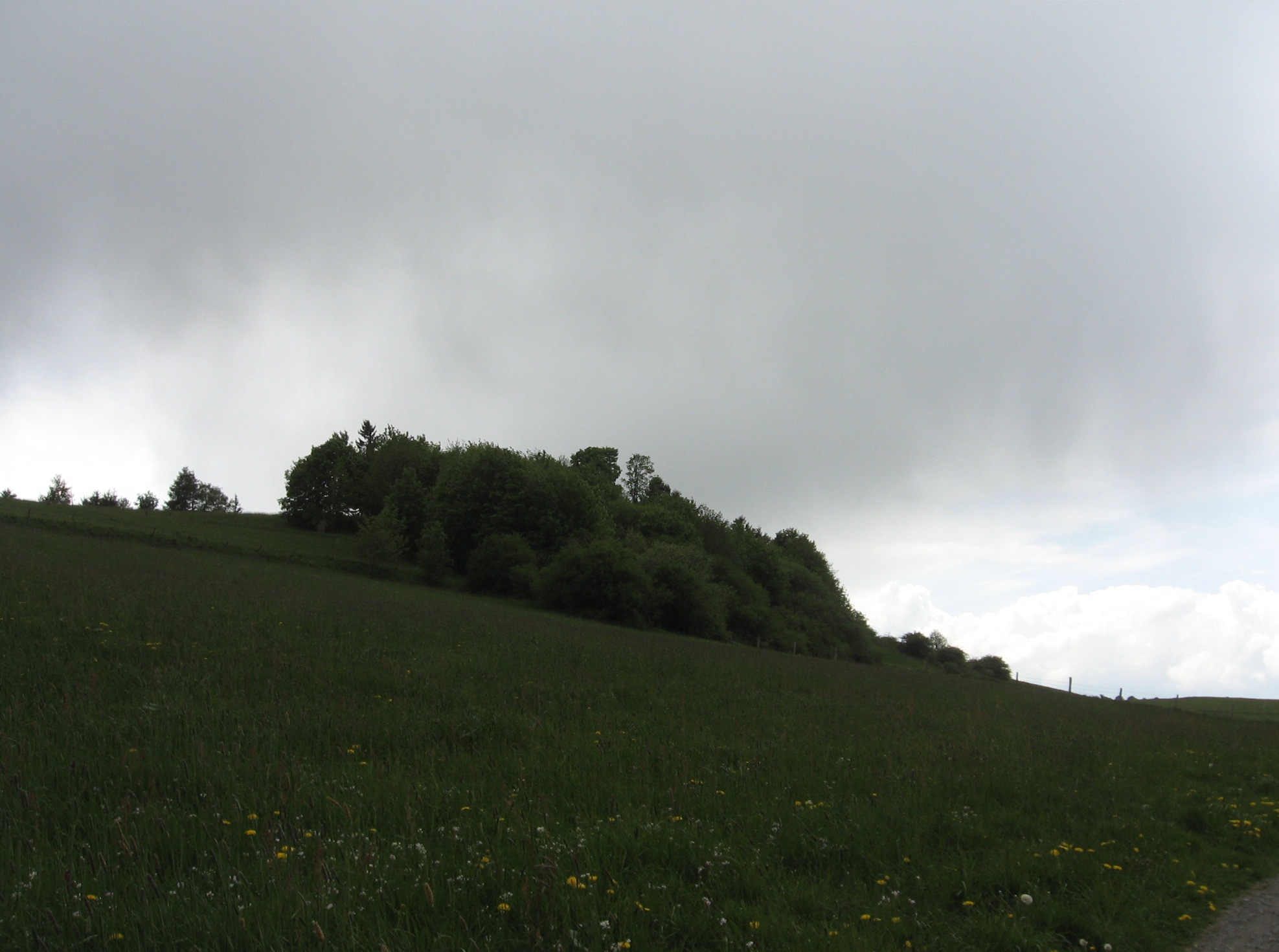 Feldgehölz im Naturschutzgebiet Haar von Nordosten.